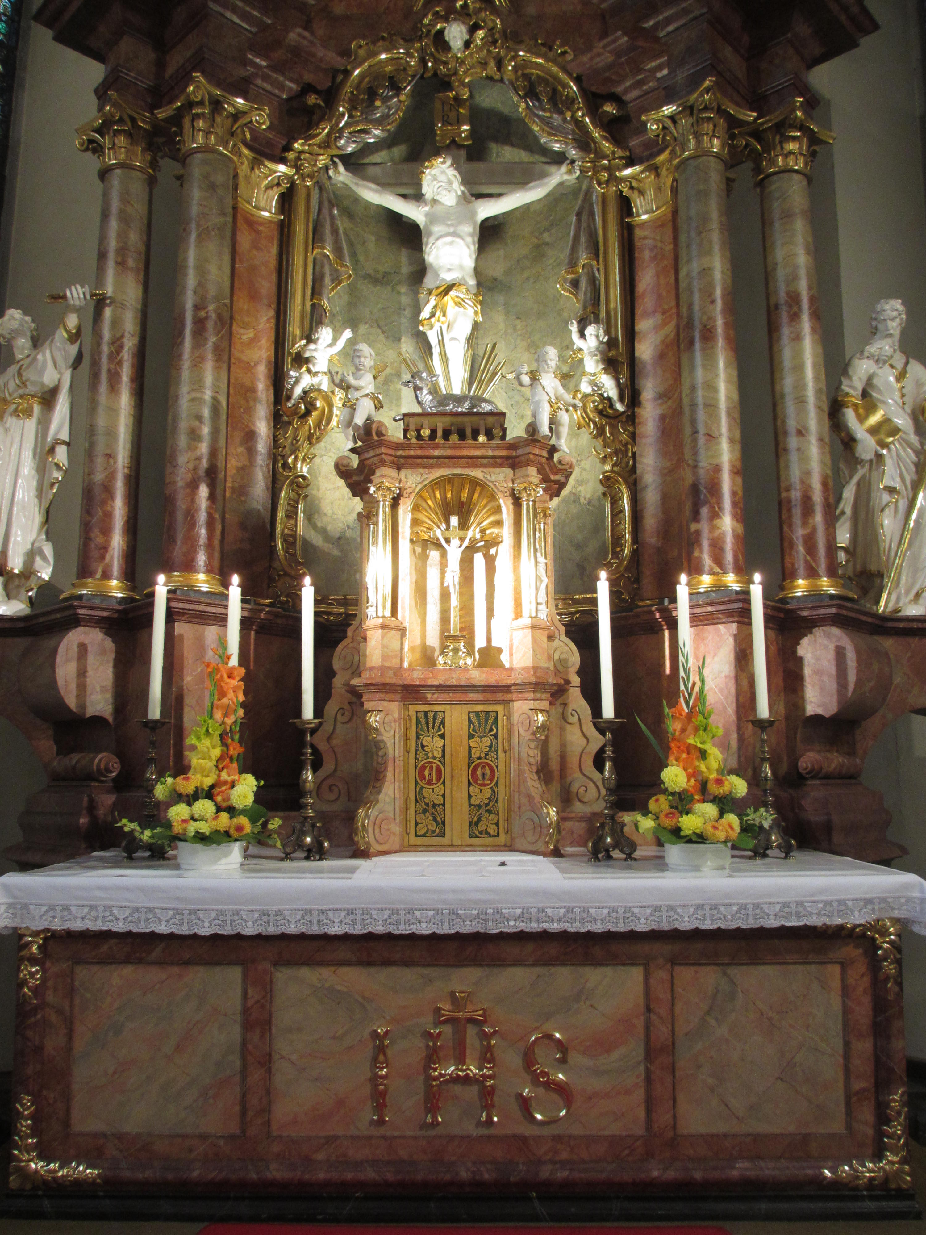 Hauptaltar in Mariä Verkündigung Heldenbergen, Nidderau, Main-Kinzig-Kreis, Hessen, Deutschland